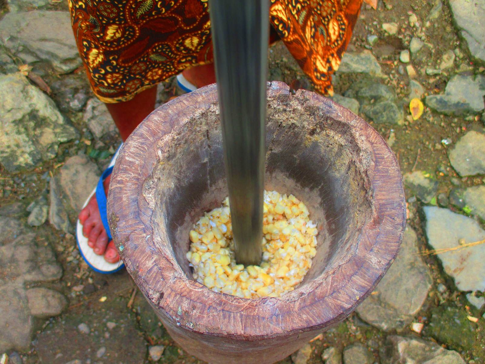 Menghaluskan jagung dengan cara tradisional !!